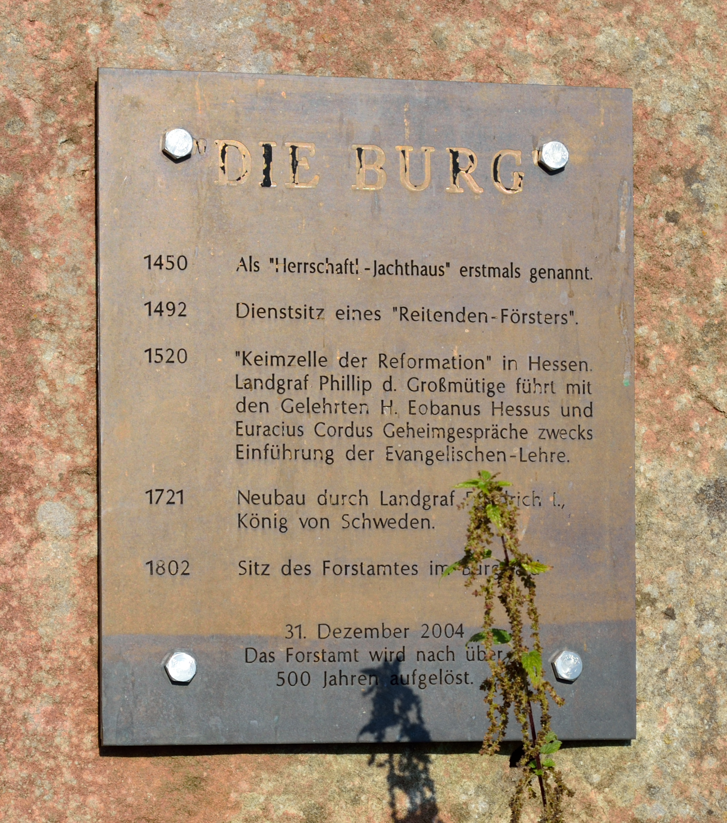 Schild vor dem Jagdschloss Bracht ("Die Burg") in Bracht (Rauschenberg) Schlecht lesbar: ...1721 Friedrich I., 1802 ...Burgwald